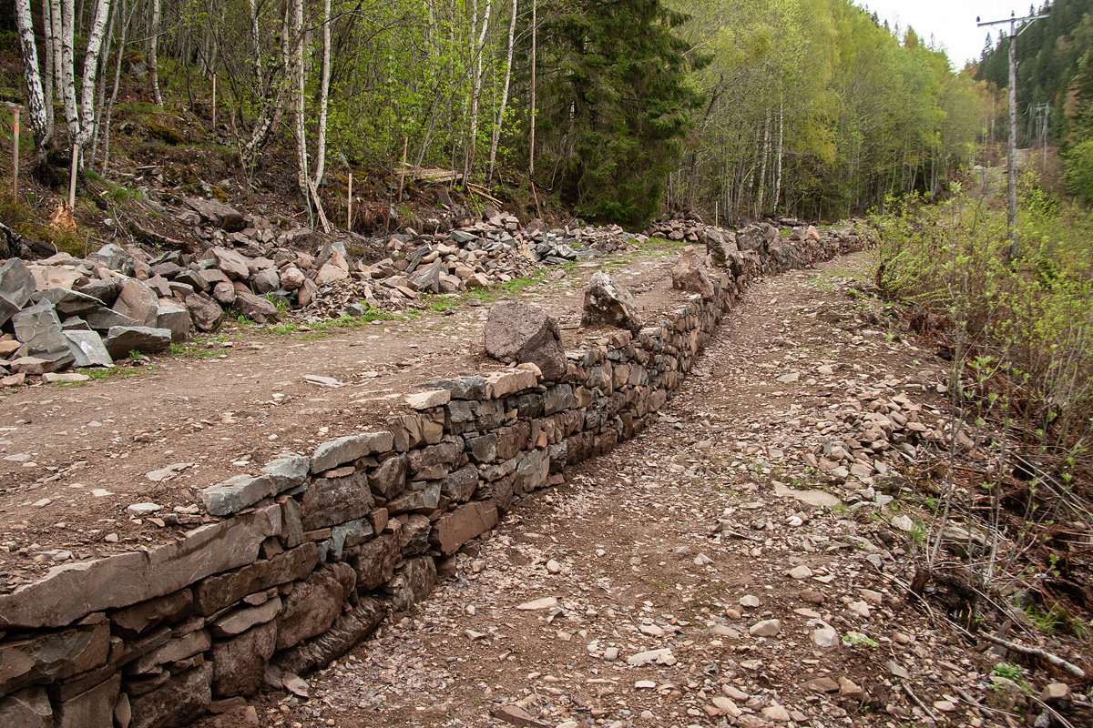 Parti av Krokkleiva som er restaurert med stabbesteiner. Arbeidet ble utført av sherpaer i 2018.